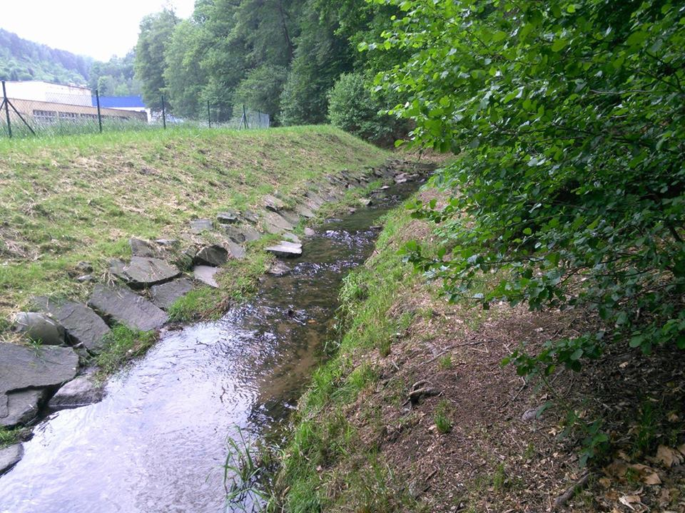 Potok.